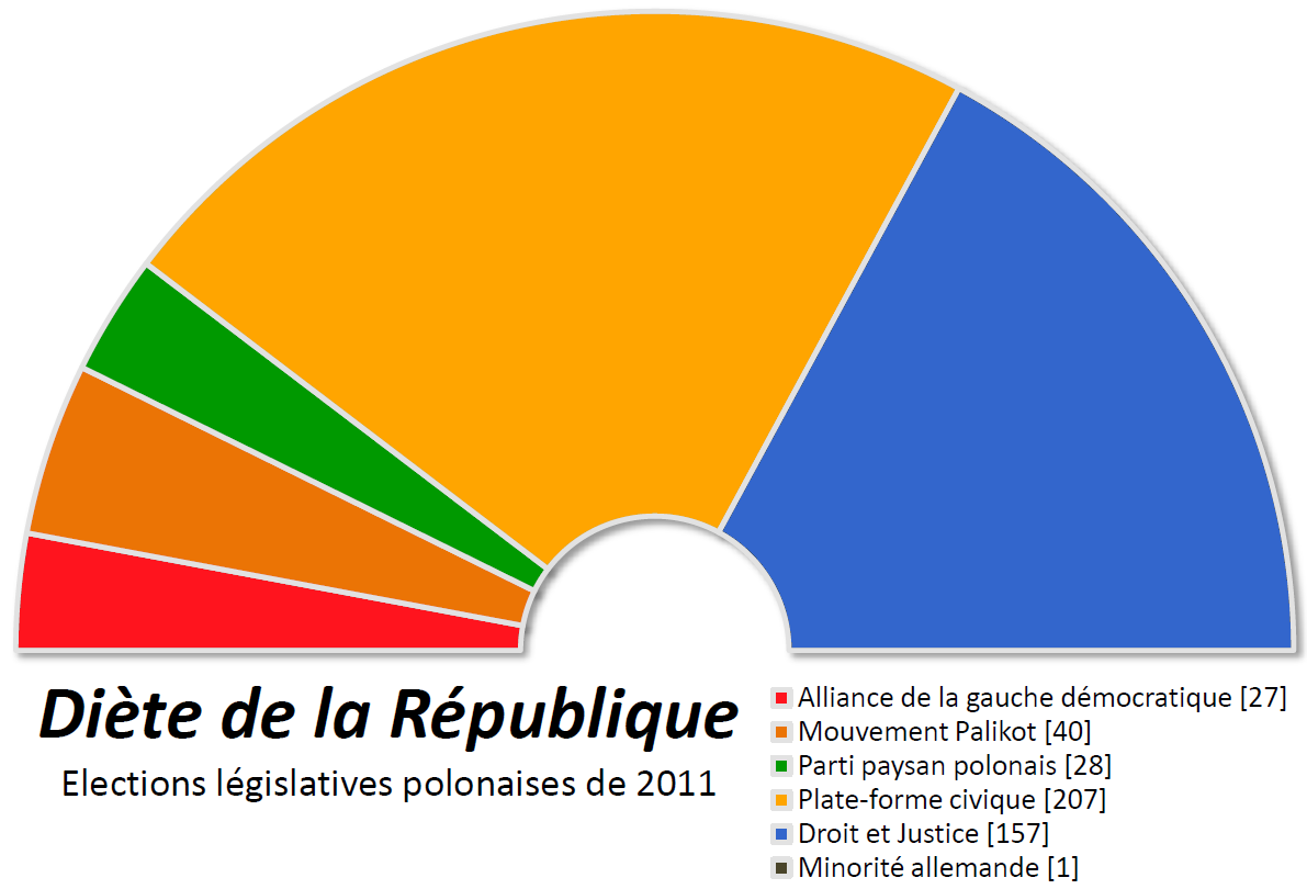 Composition politique de la Diète de la République polonaise après les élections législatives d'octobre 2011.